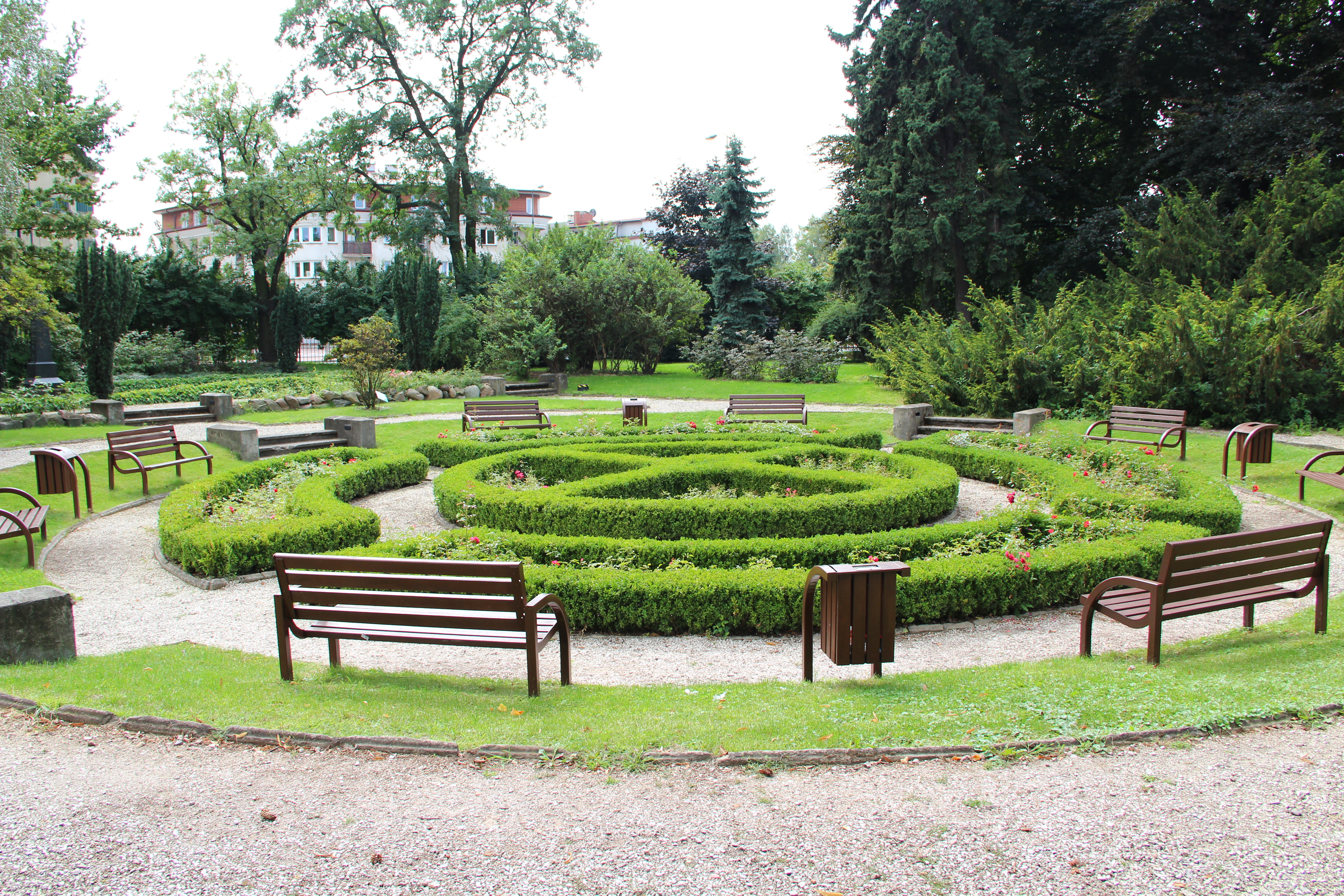 C. Ulrich Park, Warsaw